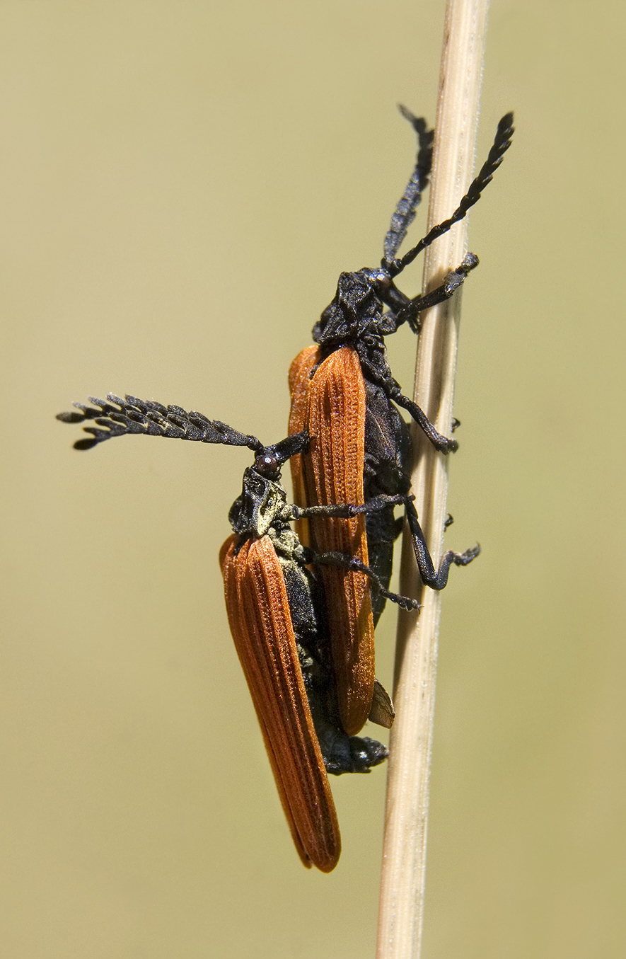 Adult Porrostoma rhipidium